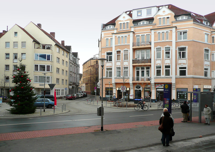 Lavesplatz Hannover